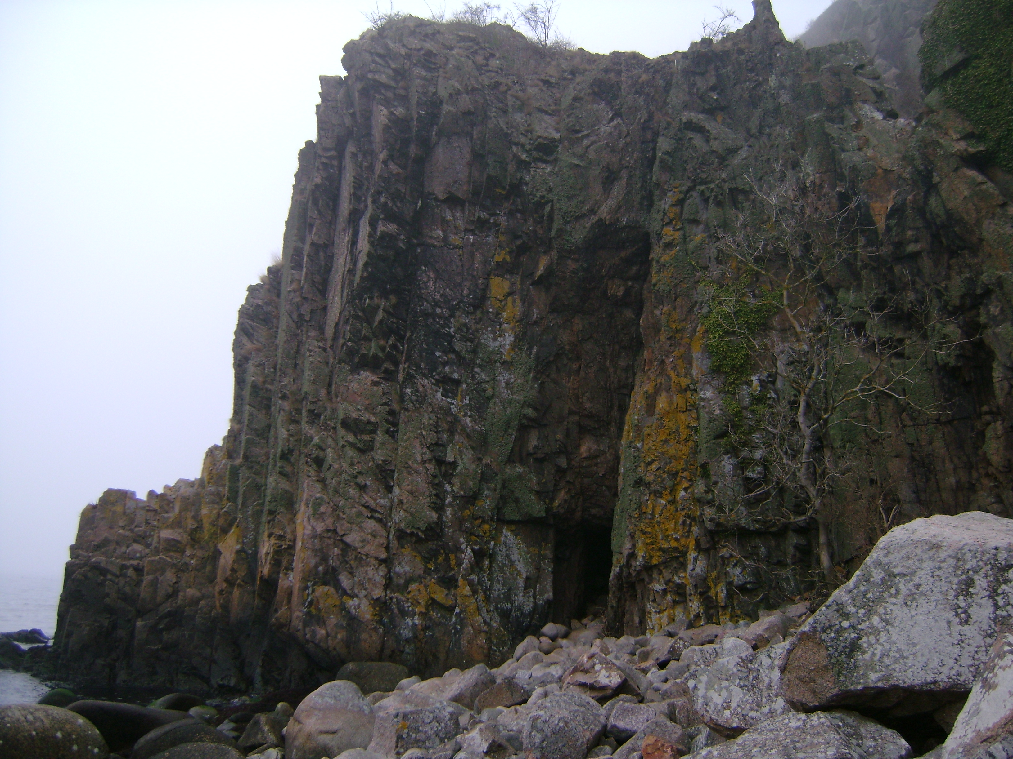 Jons Kapel, Bornholm. Hulen nederst i billedet er selve "kapellet" og prædikestolen ses øverst til højre som et "hak" ned i klippen.